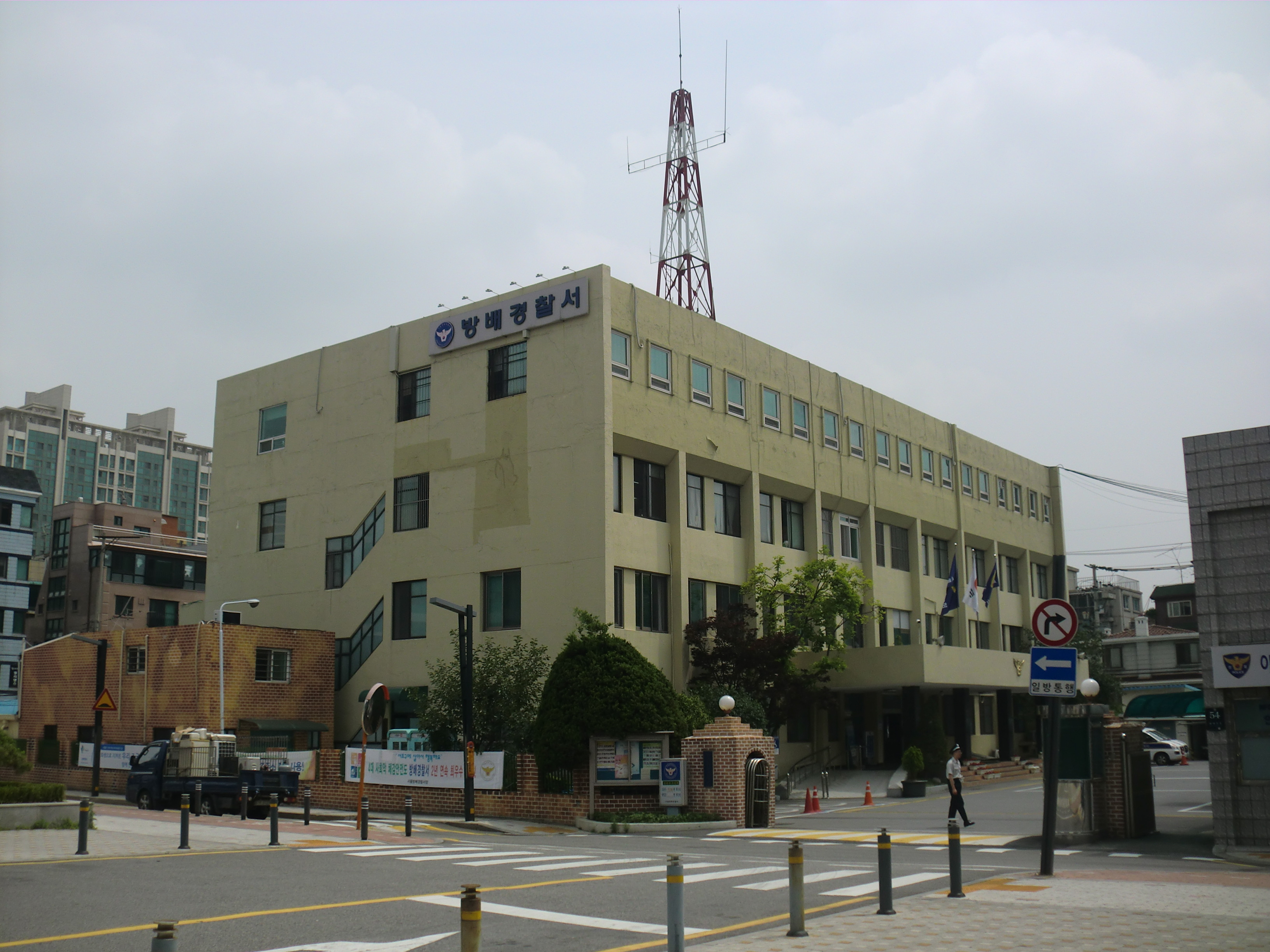 서울특별시 서초구에 있는 서울방배경찰서